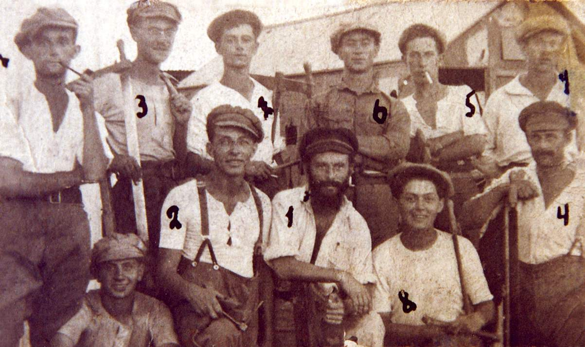 קבוצת "החלוץ", כנראה בתקופת ההכשרה לפני העלייה או עם התיישבותם בכנרת. יואל ולבה מסומן בספרה 8.